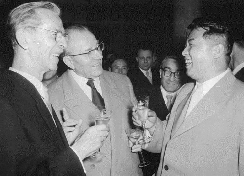 Berlin, Otto Nagel, Otto Grotewohl, Kim Ir Sen Zentralbild Junge 9.6.1956 Festempfang zu Ehren der koreanischen Regierungsdelegation Am 8.6.1956 gab der Ministerrat der Deutschen Demokratischen Republik zu Ehren der Regierungsdelegation der Koreanischen Volksdemokratischen Republik im Haus der Ministerien in Berlin einen festlichen Empfang. UBz- Während des Empfanges. In angeregtem Gespräch v.l.n.r.: der Präsident der Deutschen Akademie der Künste Nationalpreisträger Prof. Otto Nagel; Ministerpräsident Otto Grotewohl und Kim Ir Sen, Vorsitzender des Ministerkabinetts der Koreanischen Volksdemokratischen Republik, Vorsitzender des ZK der Partei der Arbeiter Koreas. Abgebildete Personen: Nagel, Otto Prof.: Maler, Präsident der Akademie der Künste (AdK), Nationalpreisträger, Vaterländischer Verdienstorden (VVO) in Gold, DDR (GND 118586300)